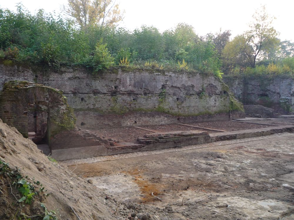 widok na schron główny